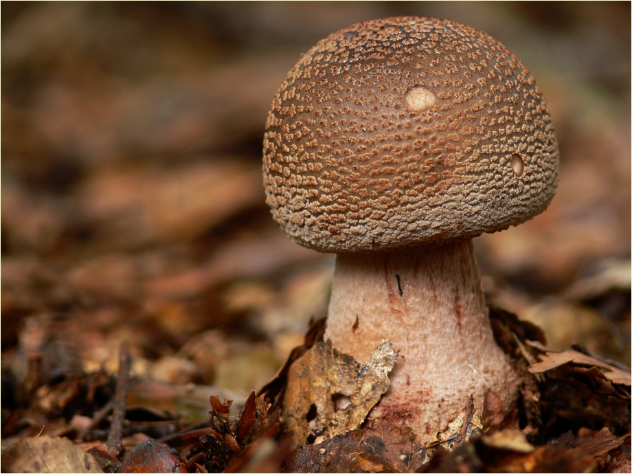 Perlpilz (Amanita rubescens)